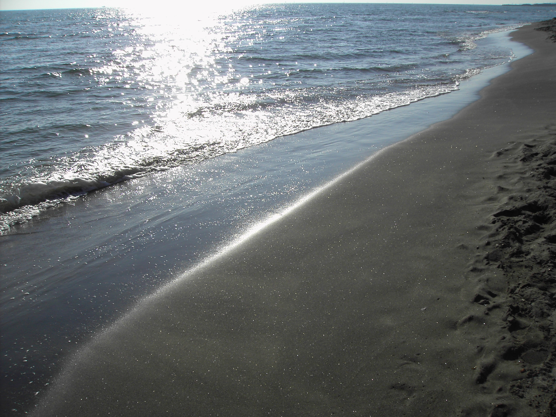 Ostia - mare d'aprile